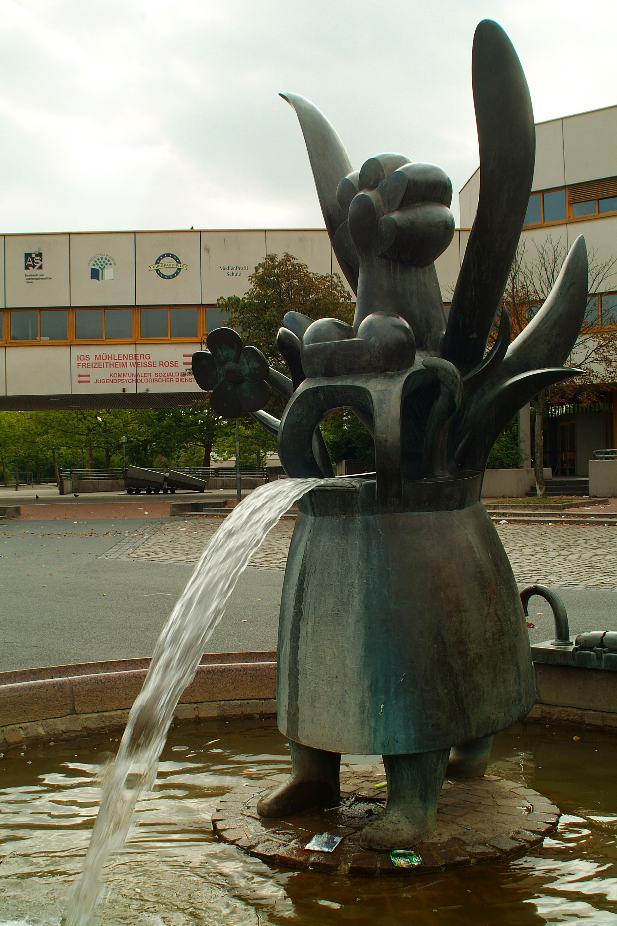 Ansichten und Details des Anna-Blume-Brunnens auf dem Mühlenberger Markt ...